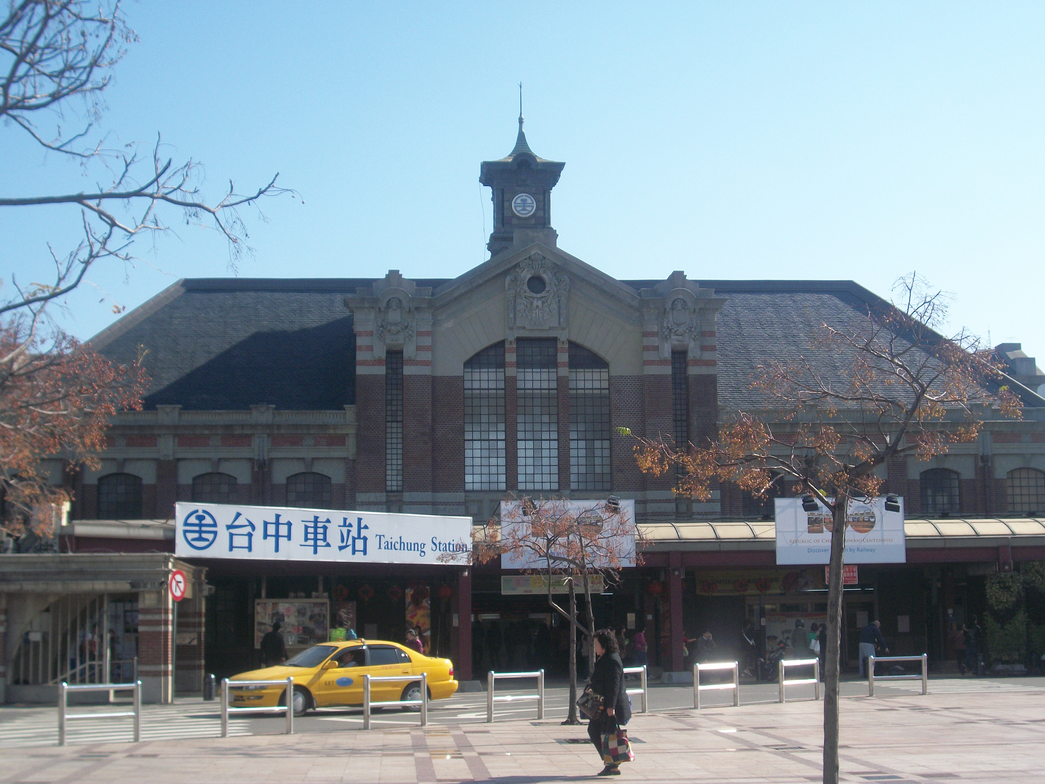 中文（台灣）: 台中車站。